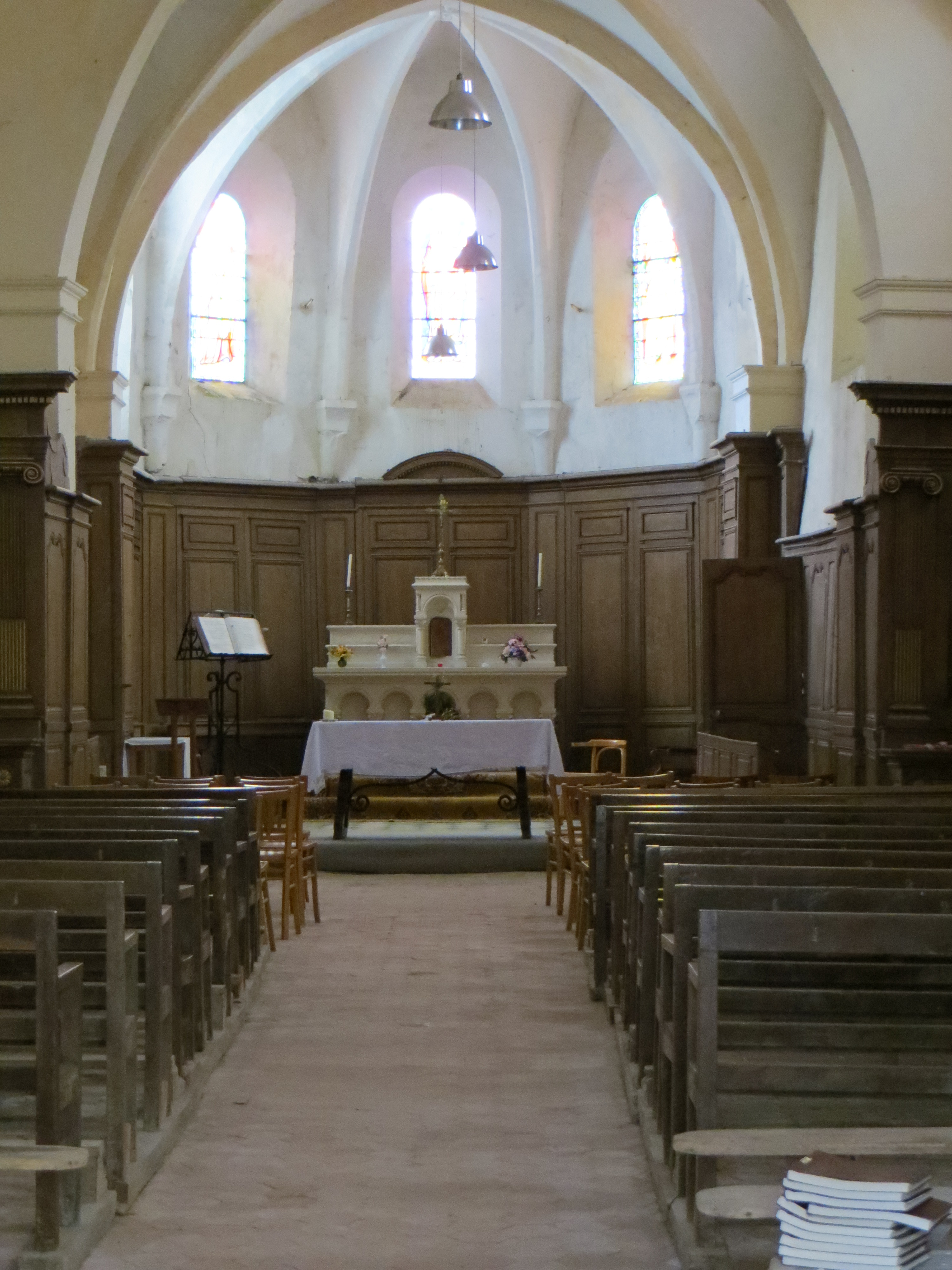 Vue de la nef